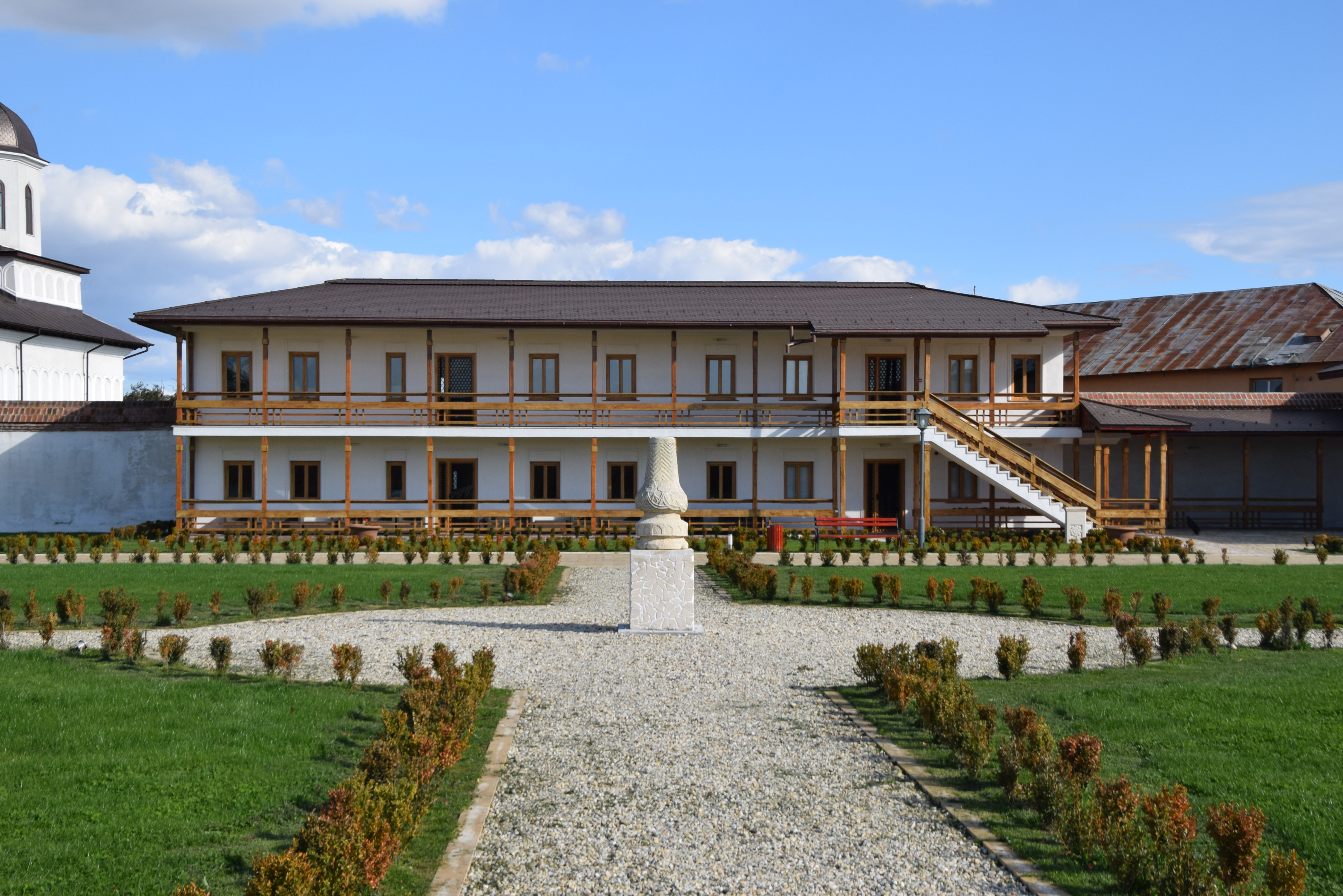 Ruine caselor slujitorilor nu mai sunt vizibile, clădirea fiind reconstruită în timpul restaurării din 2014. 04